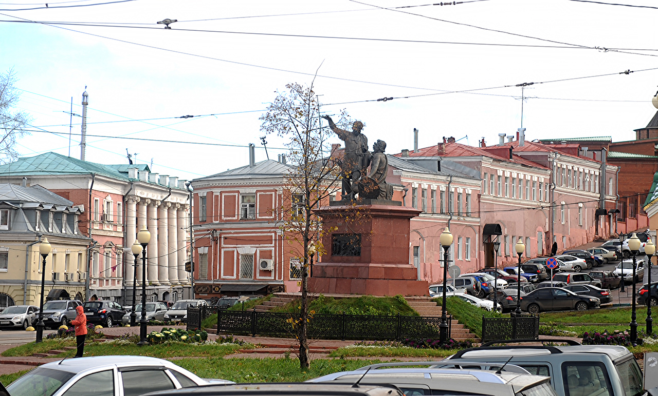 Минин и Пожарский